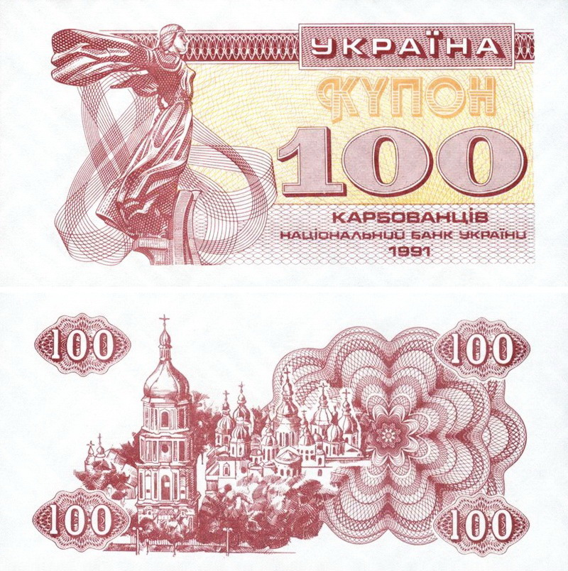 100 карбованців 1991 року